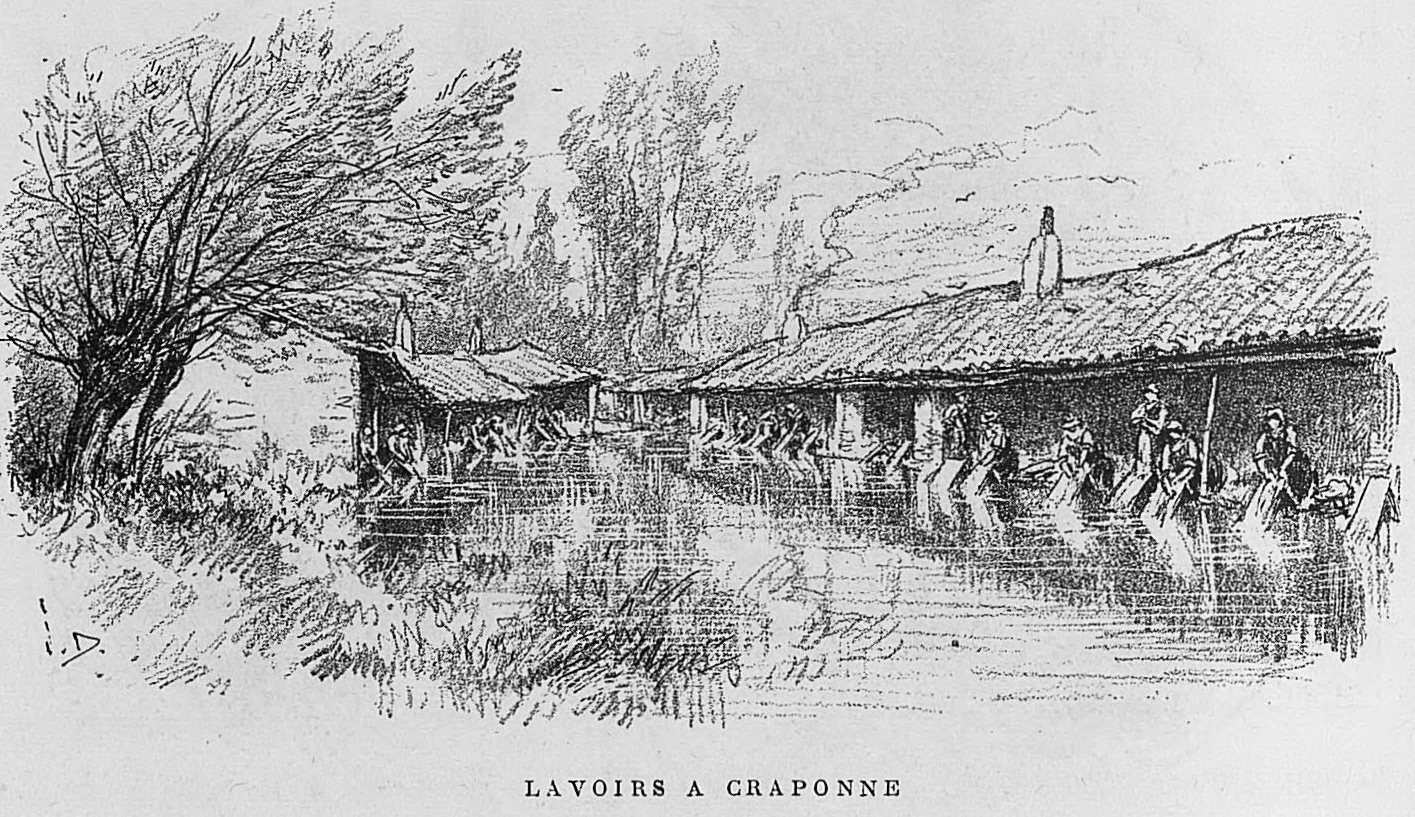 Aux environs de Lyon / Monsieur Josse ; préface de M. Coste-Labaume ; édition illustrée de 250 dessins de J. Drevet.